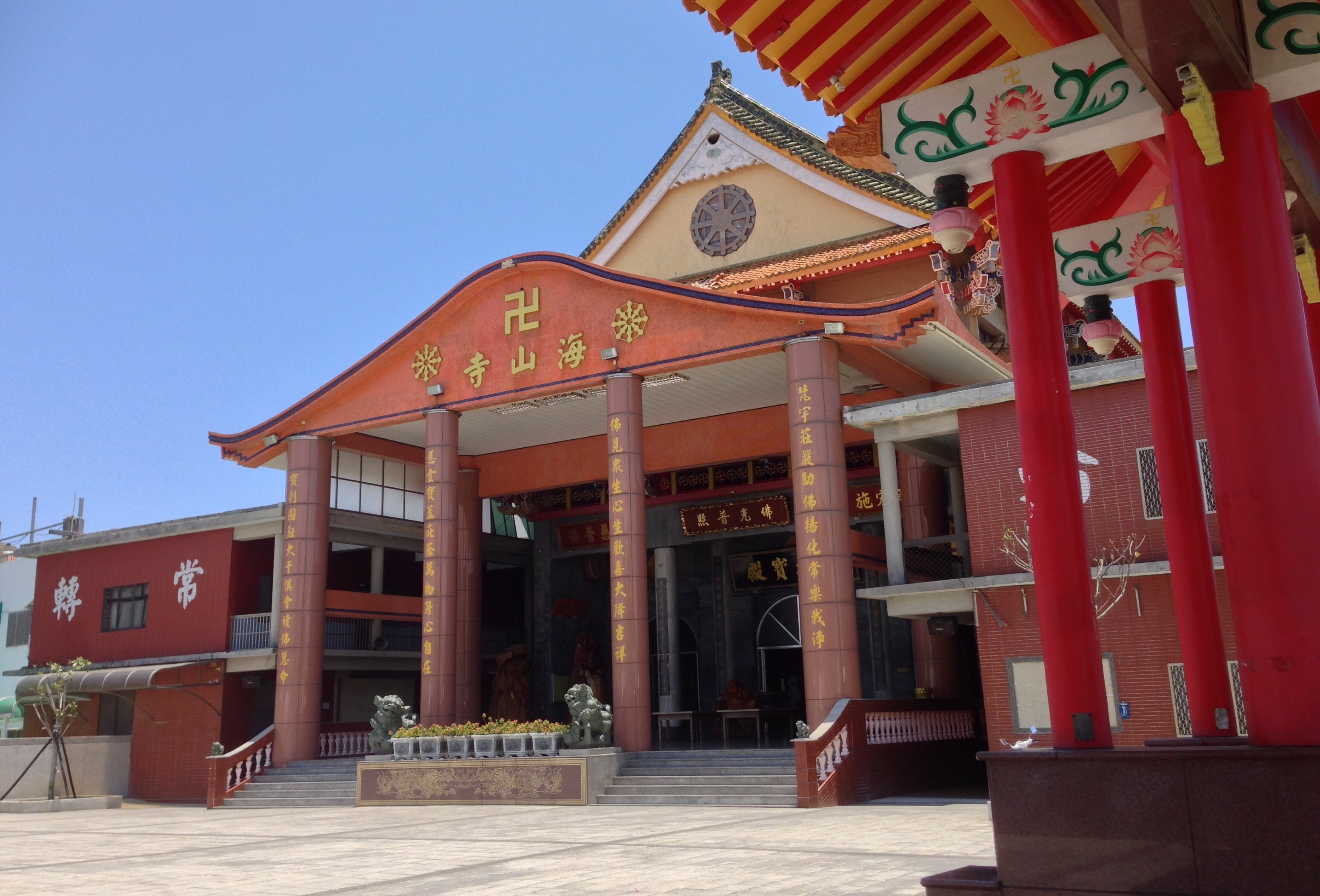 中文（台灣）: 海山寺大雄寶殿外觀側照